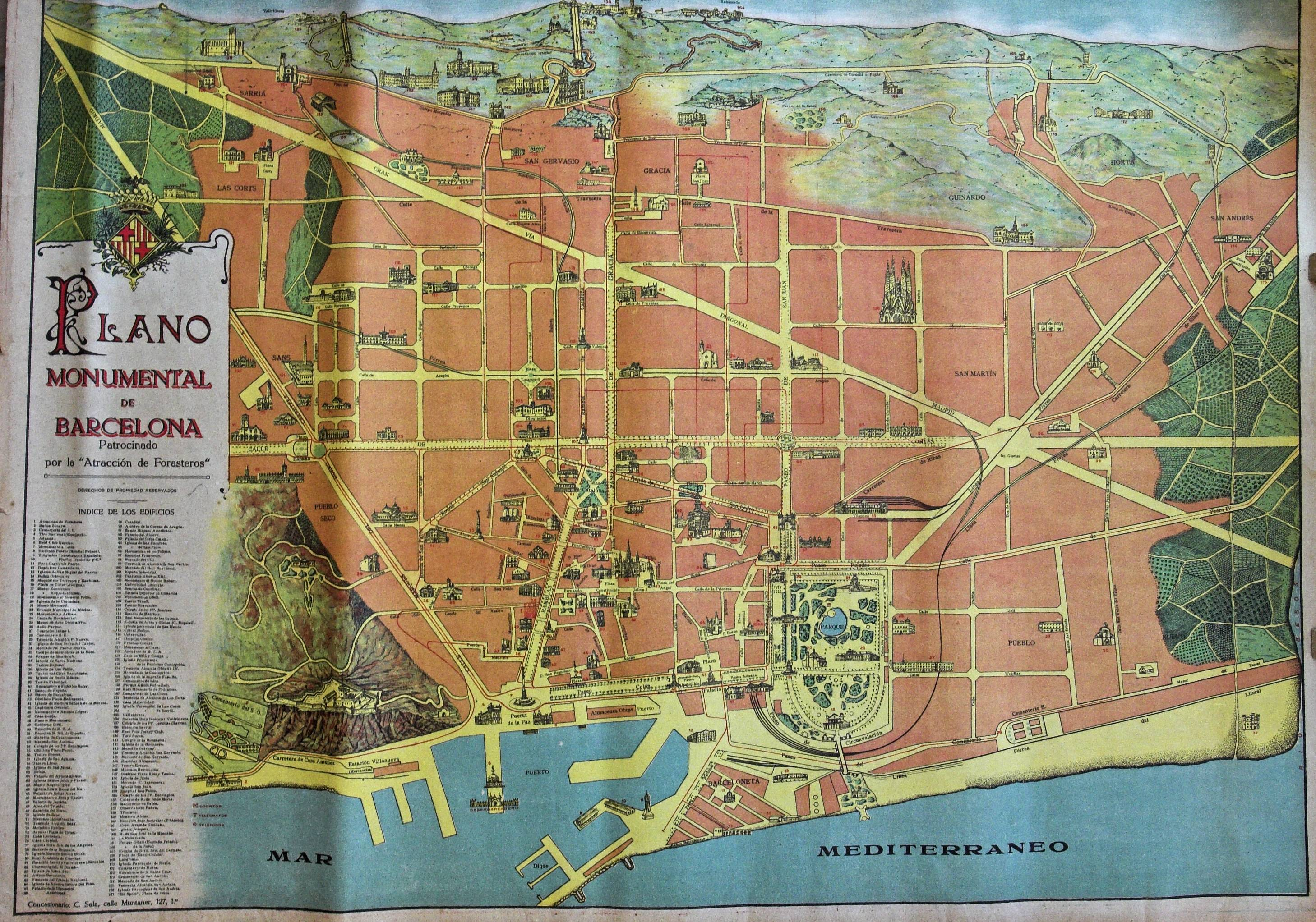 Planol de Barcelona editat per la Societat d'Atracció de Forasters (1920 aprox). Touristic map of Barcelona (1920) issue by the Societat d'Atracció de Forasters, the first tourism organization in Spain.